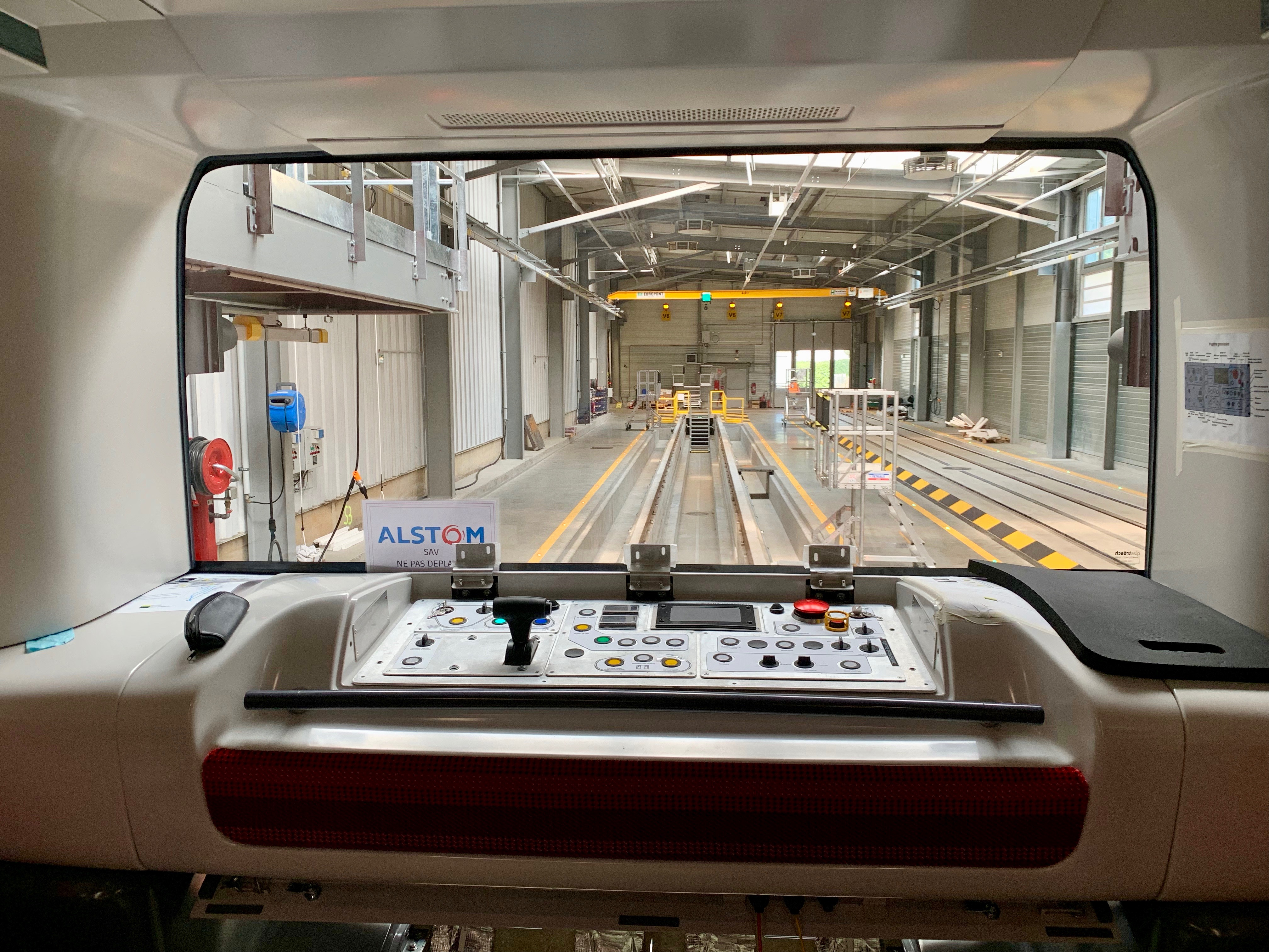 Pupitre provisoire de pilotage des rames MPL16, du métro de Lyon.